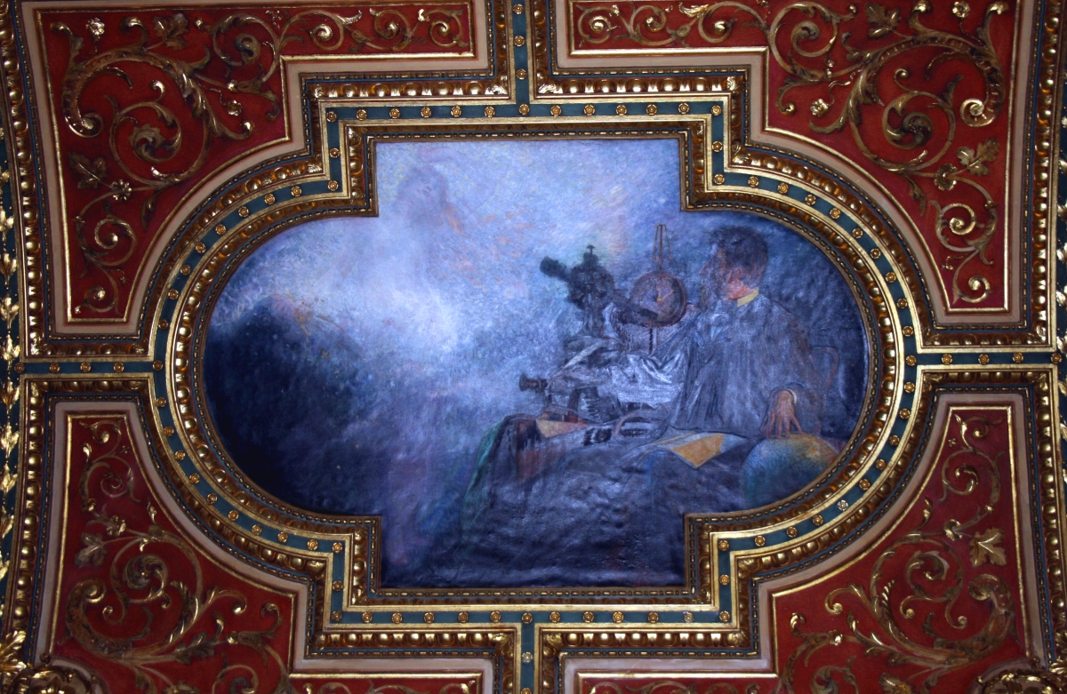 Znanost, rad Ivan Tišov u Hrvatskom institutu za povijest u Zagrebu